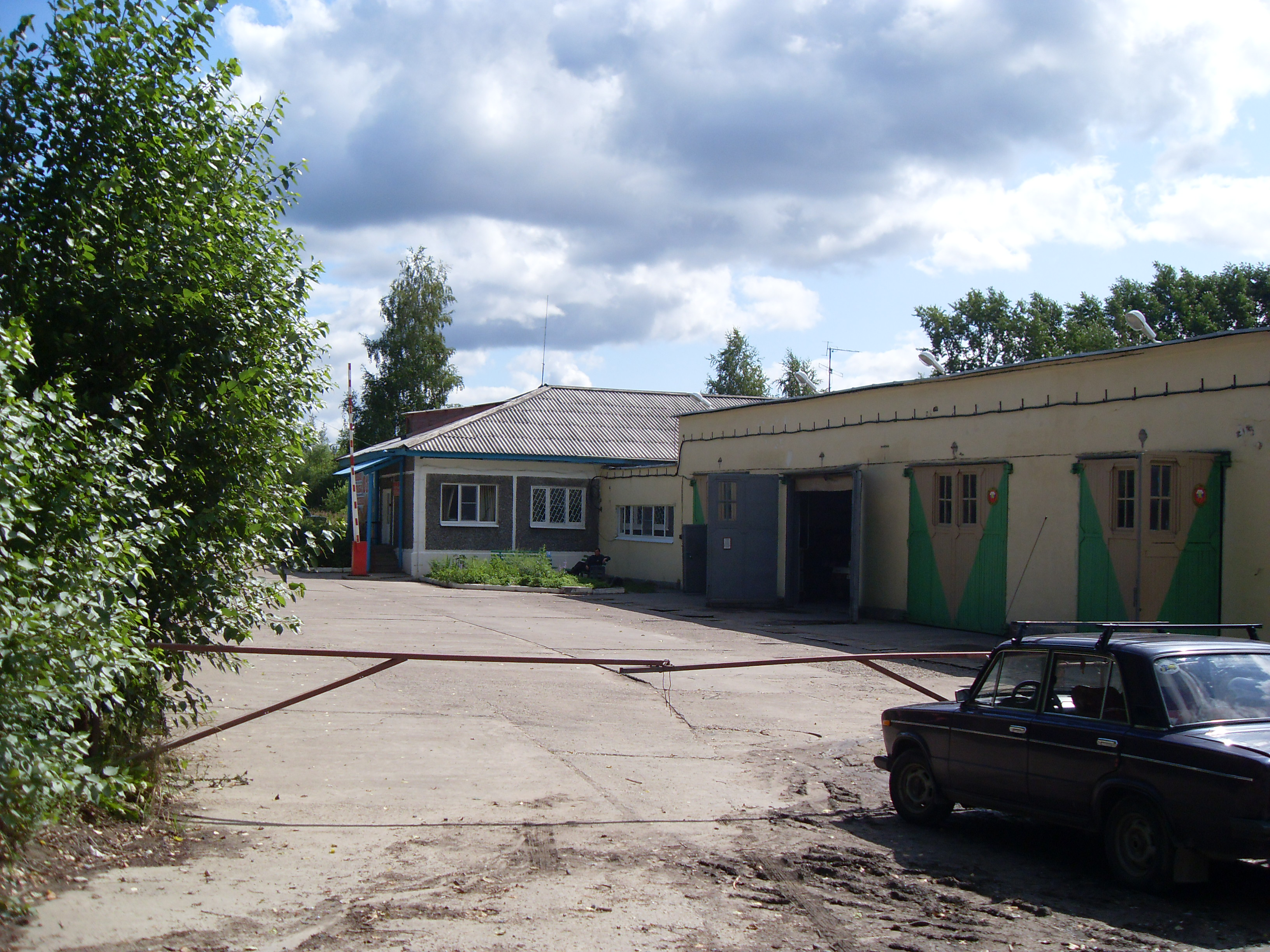 ПЧ-33 Отряд государственной противопожарной службы N 7 по охране г.Коряжмы, Вилегодского и Ленского районов